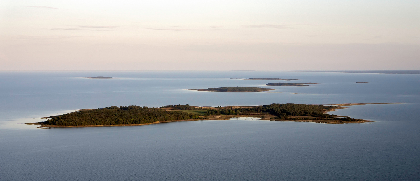 Hanikatsi laid